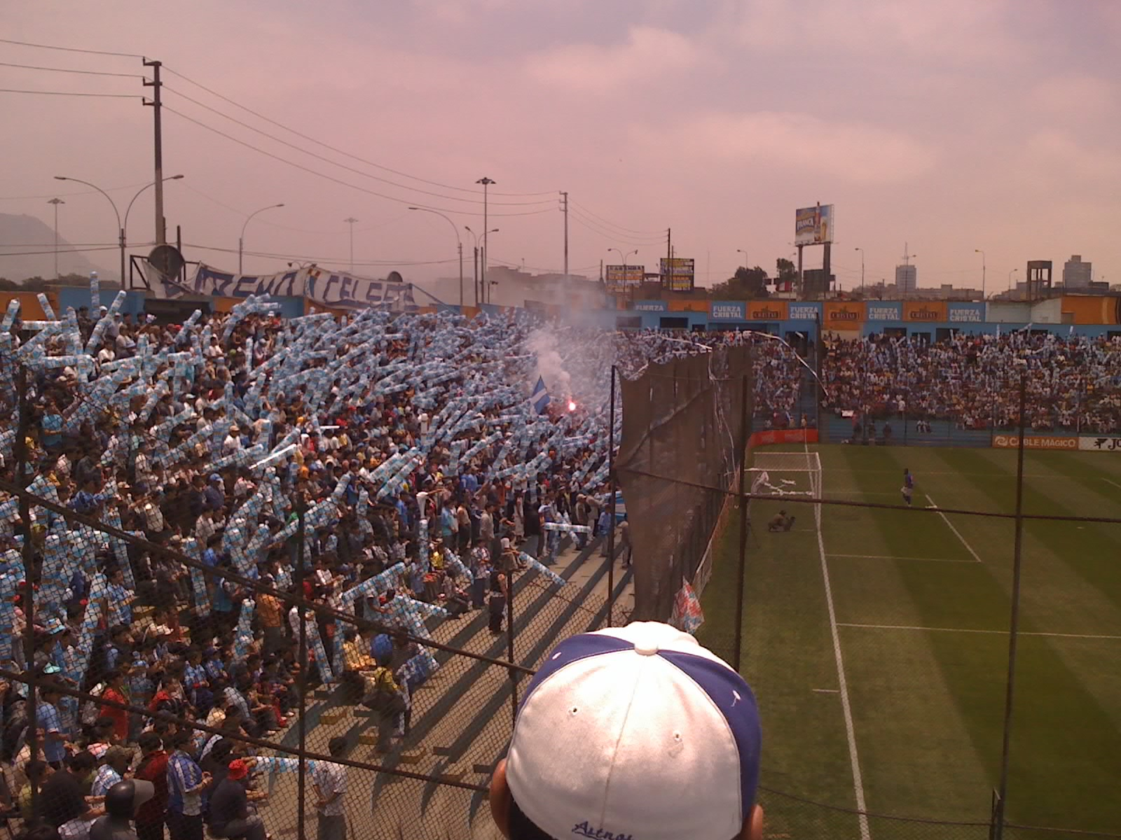 Foto de la hinchada popular "Extremo Celeste" del club Sporting Cristal en la tribuna popular del Estadio San Martín en Lima, Perú